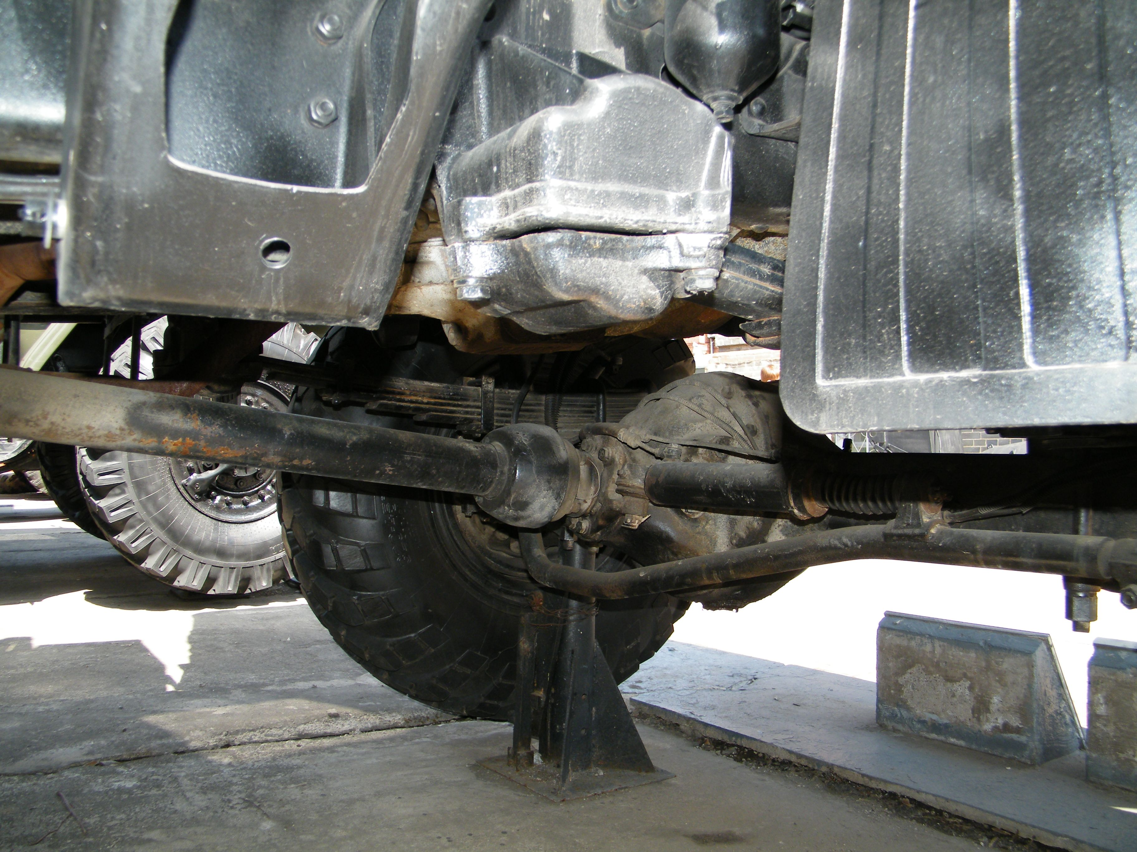 Газ-66 снизу